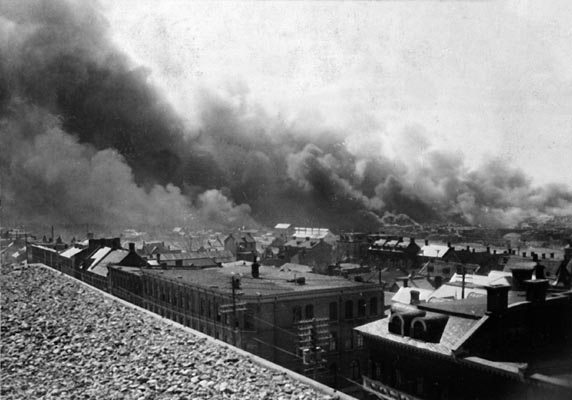 Photos prise au moment où Hull brûlait (Grand Feu de 1900) Visible: édifices de briques.